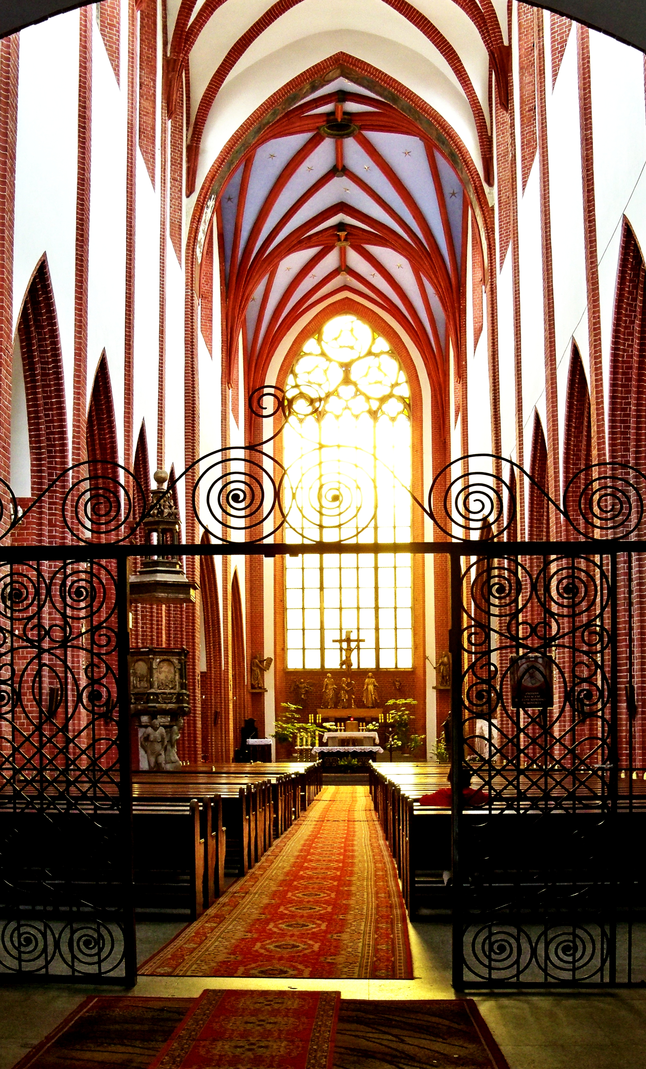 Katedra polskokatolickaj we Wrocławiu.